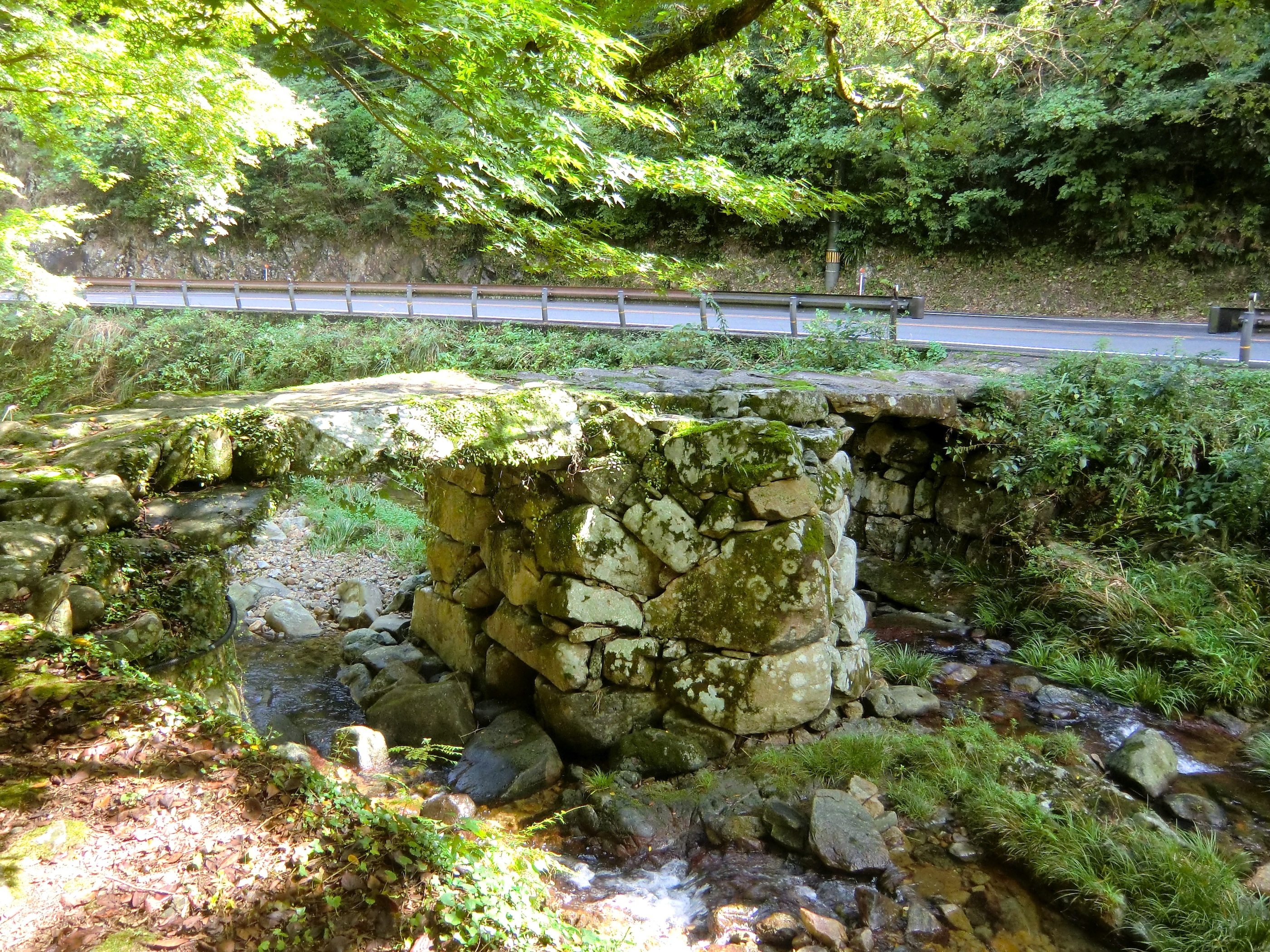 大寧寺の盤石橋（山口県長門市）